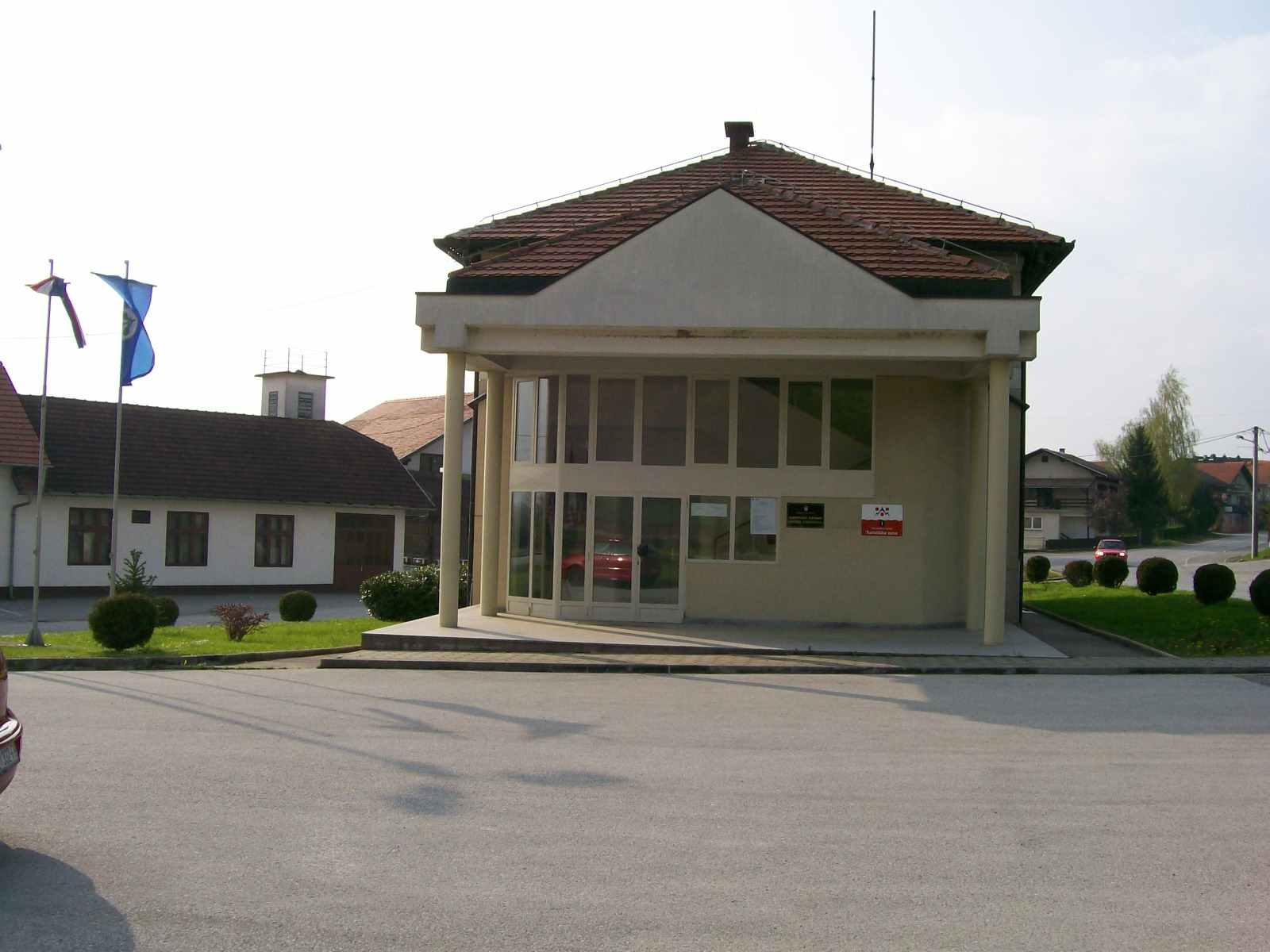 Zgrada općine Dubravica, Zagrebačka županija. Iza je vatrogasni dom